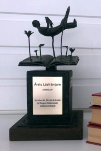 Utmärkelsen Årets Läsfrämjare är en skulptur signerad av Sundsvallskonstnären Björn Gimstedt.